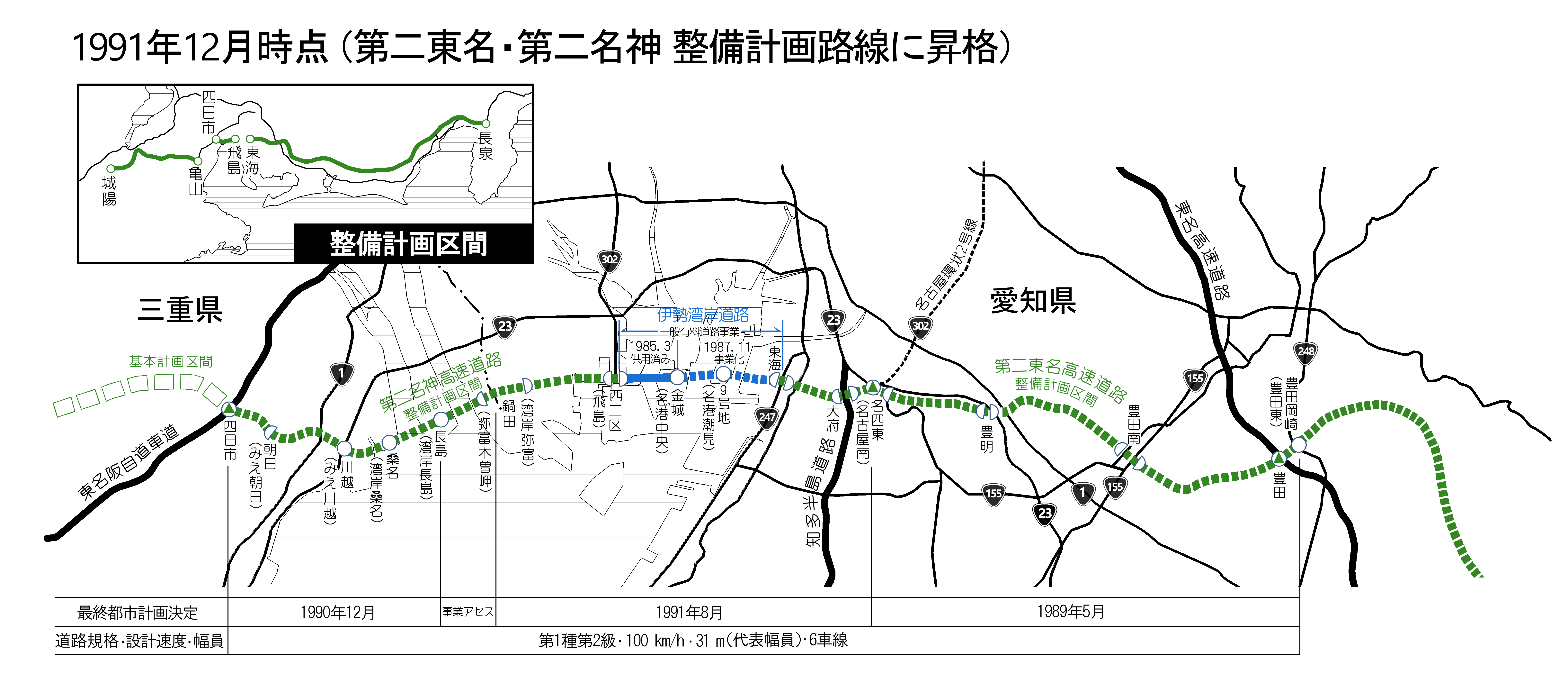 1991年12月時点の伊勢湾岸道路計画図（JPG形式）